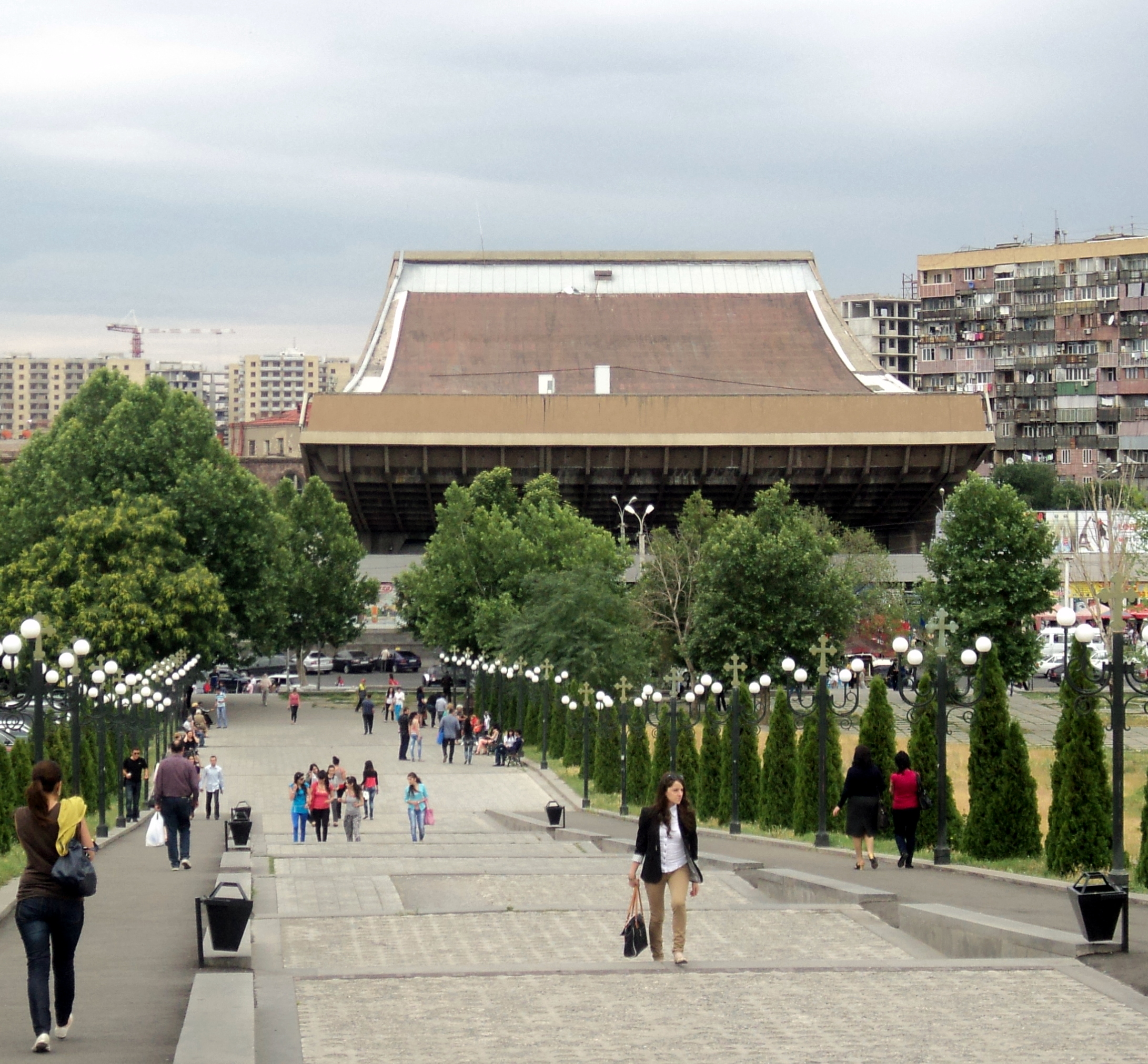 Հեղինակներ` Հրաչ Պողոսյան, Արթուր Թարխանյան, Սպարտակ Խաչիկյան